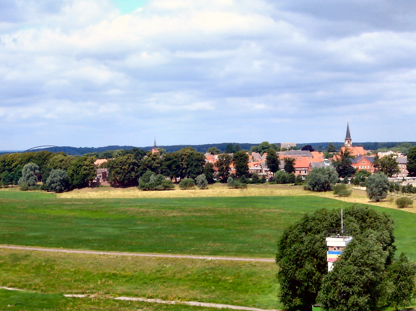 Dömitz vom Hafen aus gesehen. Im Bild von links: Bogen der Elbbrücke, Rathaustürmchen, Kirchturm. Vorn: ehemaliger Wachturm der innerdeutschen Grenze.